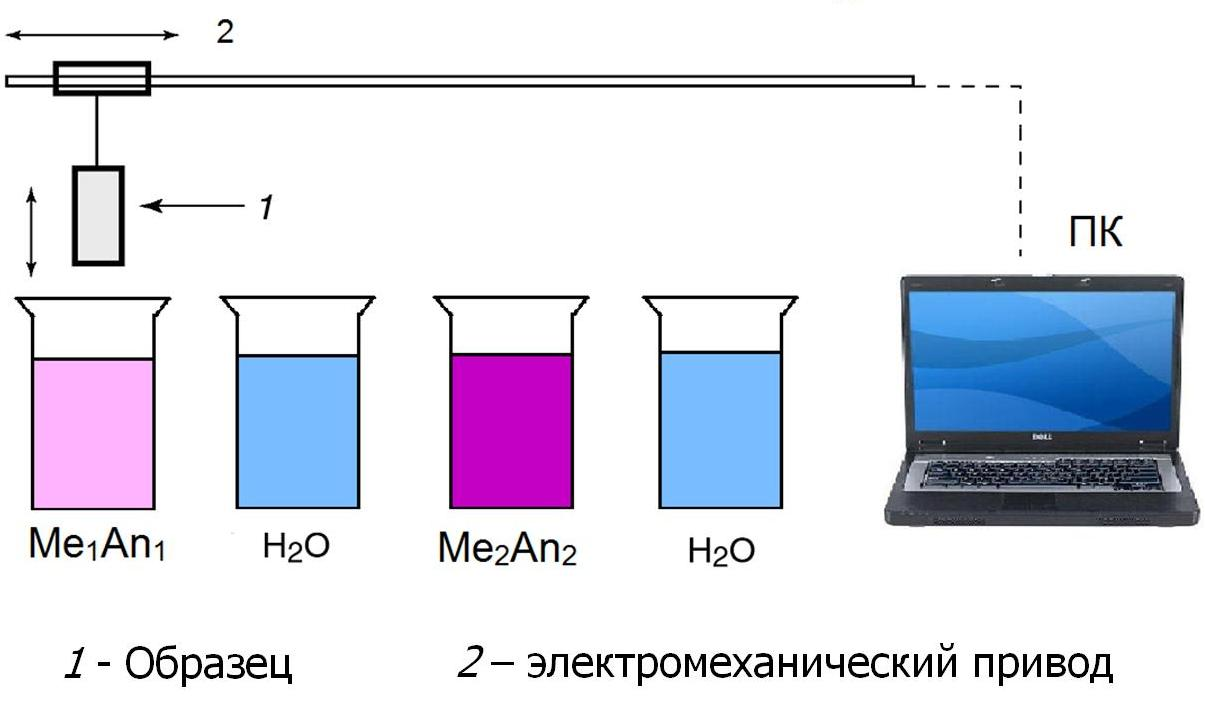 Блок-схема автоматической установки для синтеза нанослоёв